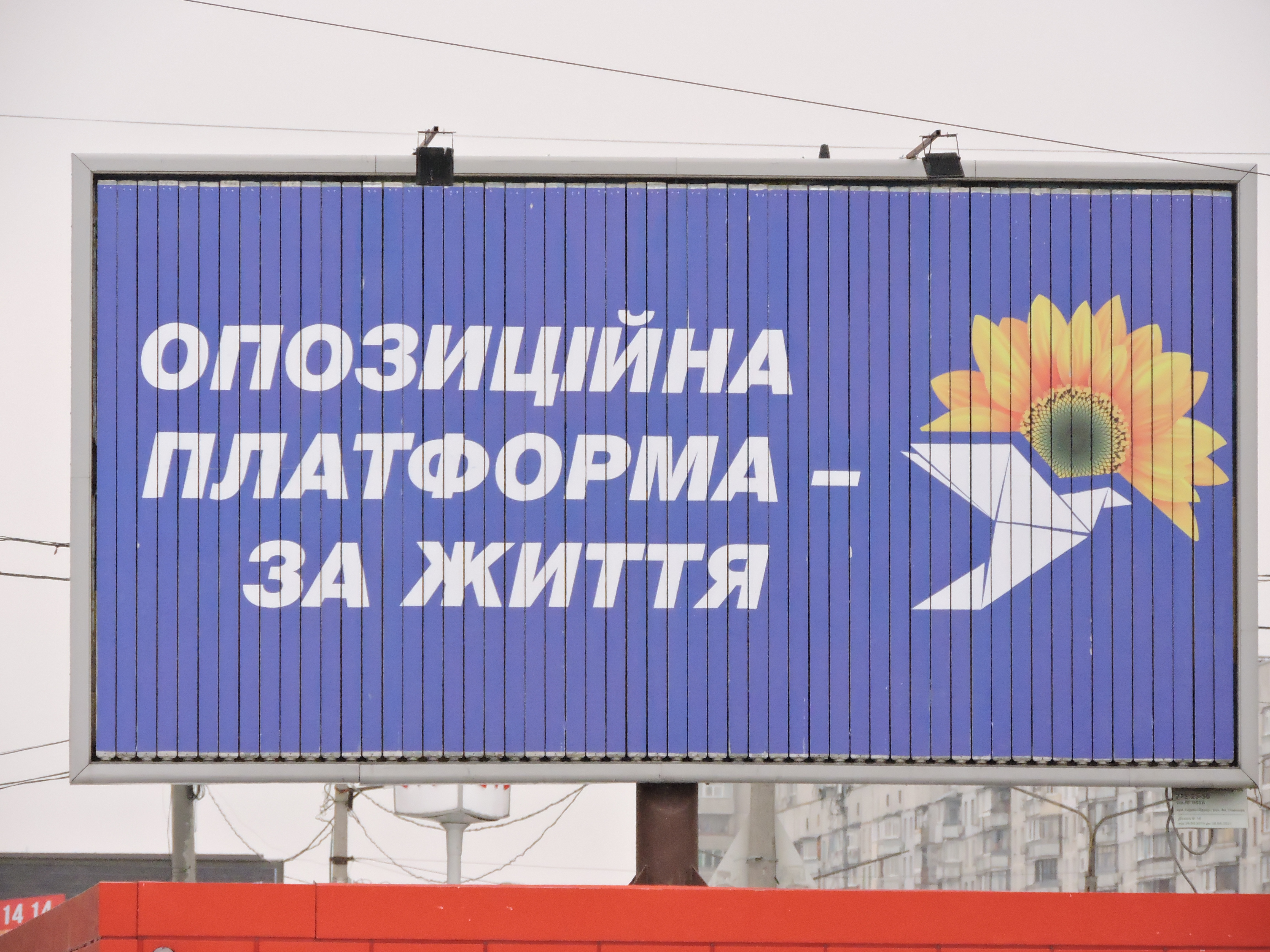 Зовнішня реклама під час агітаційної кампанії виборів Президента України 2019 року від партії «Опозиційна платформа — За життя».Білборд у м. Харкові на вулиці Академіка Павлова над виходом з метро ст. м. Героїв Праці. Лютий 2019 року.